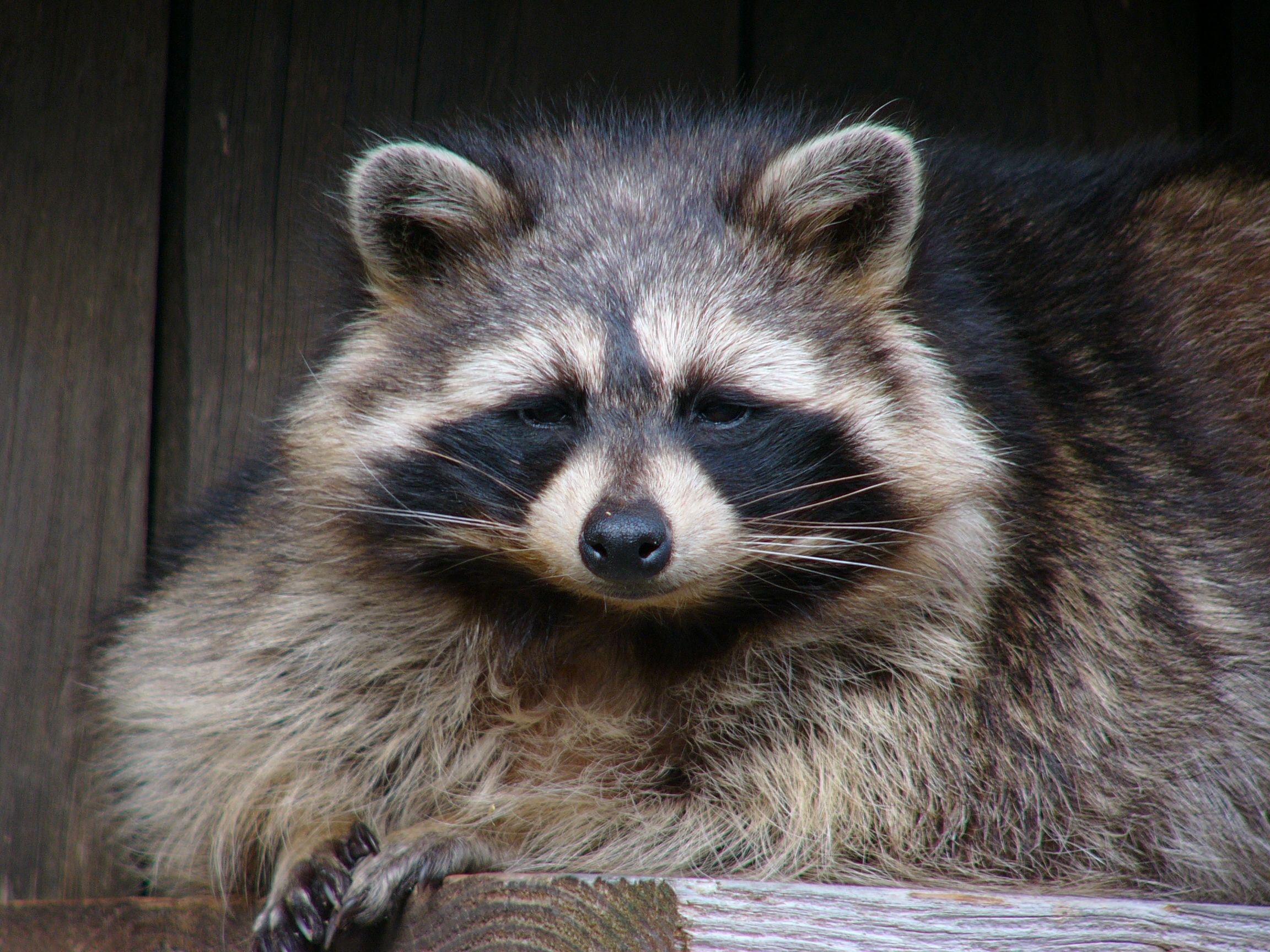 photo d'un raton laveur